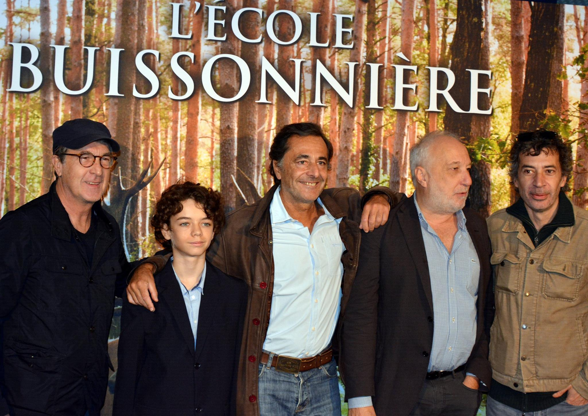 Avant-première du film "L'école buissonnière" : François Cluzet, Jean Scandel, Nicolas Vanier, François Berléand, Éric Elmosnino.